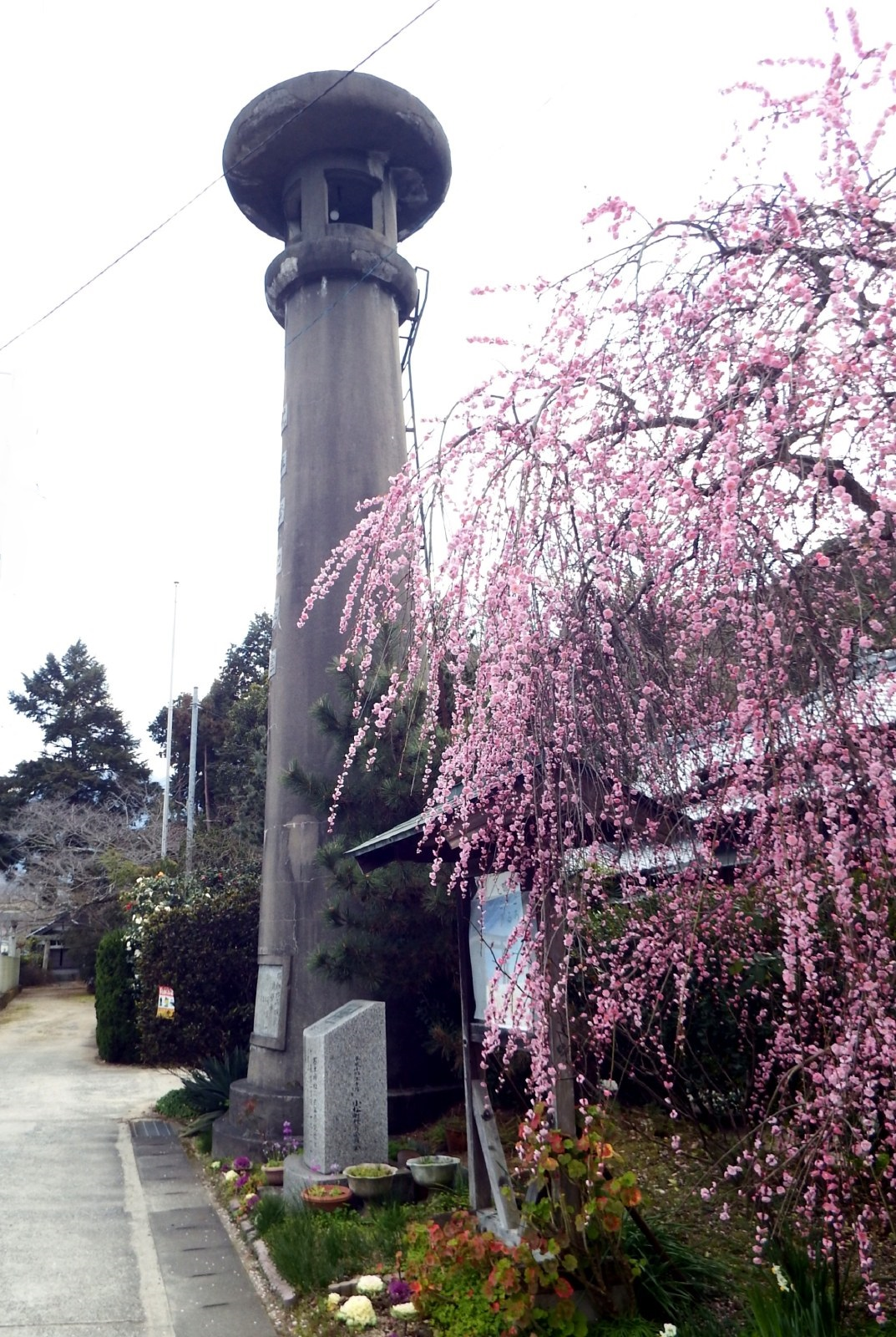 妙雲寺の高燈籠